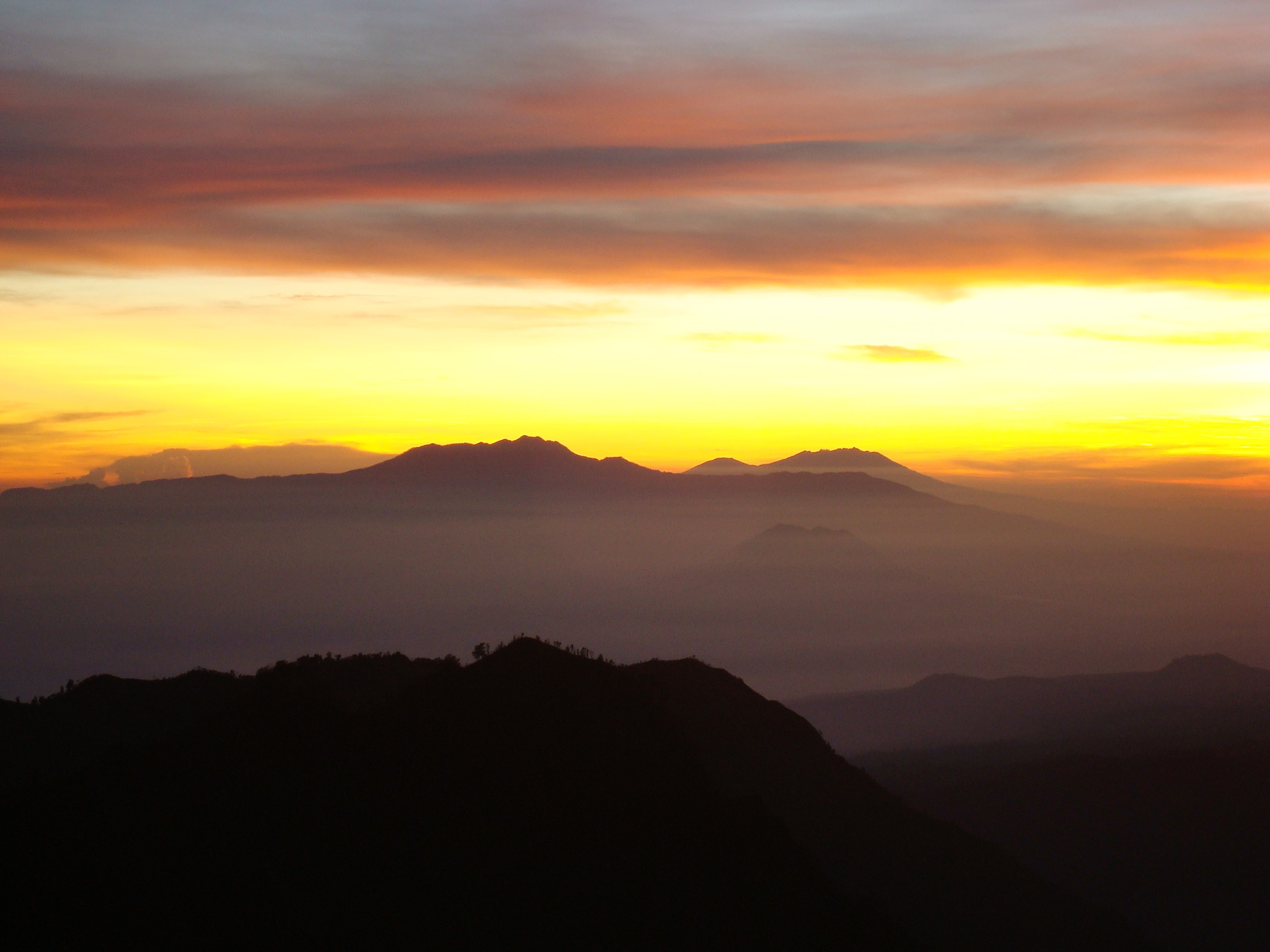 Sonnenaufgang im Bromo Tengger Semeru National Park